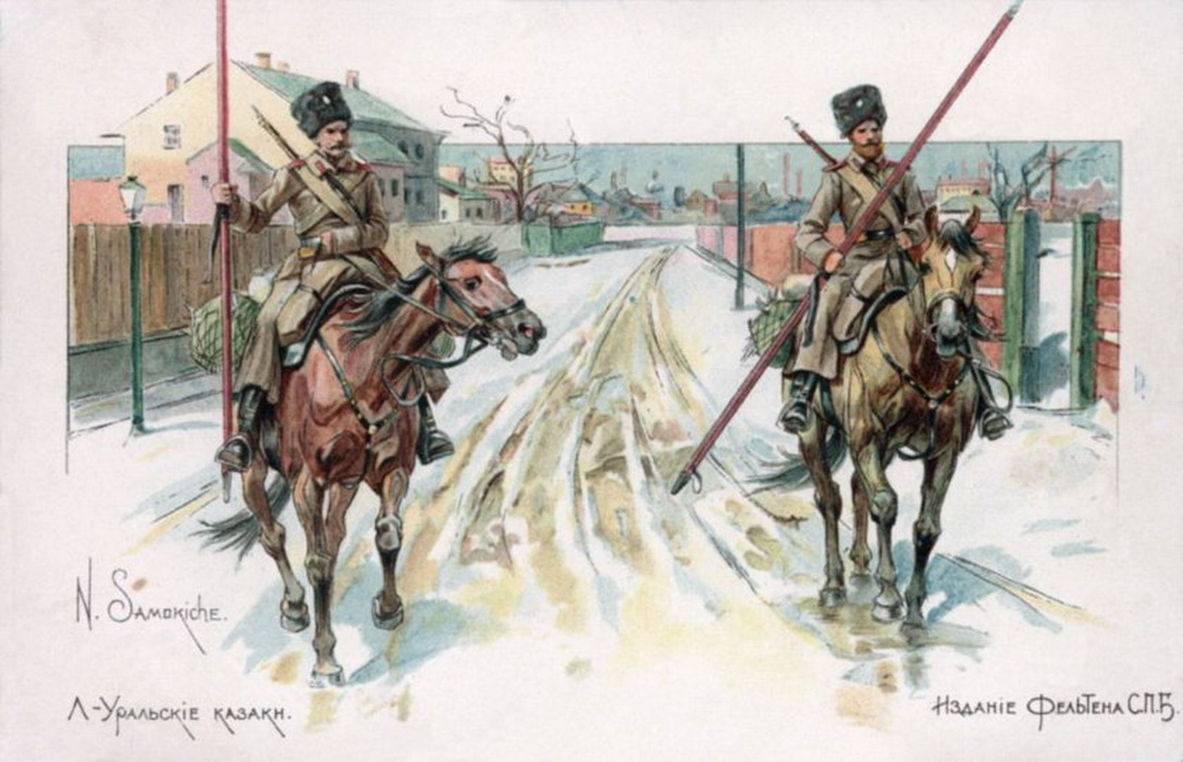 N. Samokiche. Л-Уральские казаки. Издание Фельтена. С.П.Б.